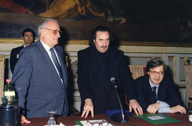 Il pittore Gino De Dominicis saluta gli intervenuti in occasione della consegna del Premio Camera dei deputati